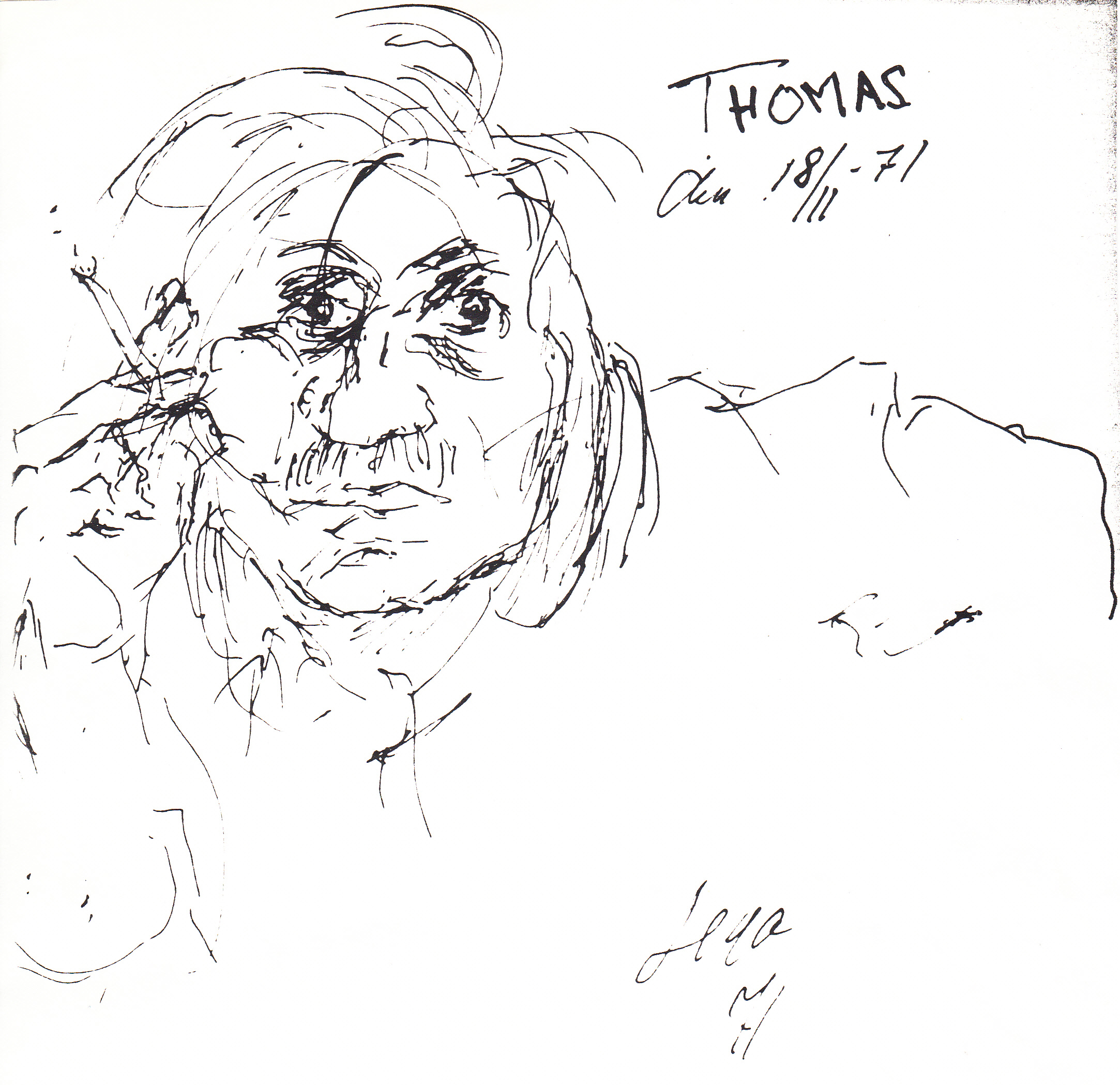 Thomas Edvardson under 1970-talet av Lena Svedberg